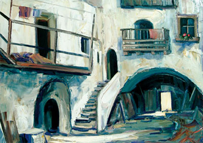 Darstellung eines Eppaner Innenhofes des Südtiroler Künstlers Ernst Müller.